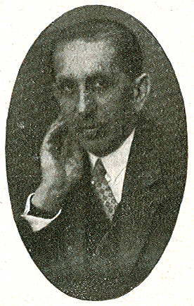 Scan einer Kopie eines ovalen Porträt-Fotos eines unidentifizierten Fotografen von Louis Sternheim, einem der Begründer des Kaufhauses Sternheim & Emanuel in Hannover ...